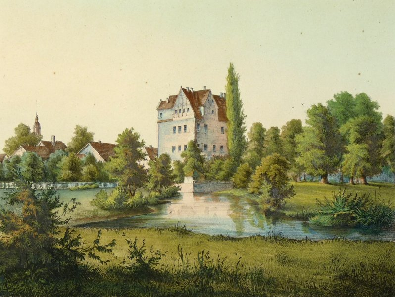 Schloss Niederrödern aus: Album der Schlösser und Rittergüter im Königreiche Sachsen .... Section II: Meissnischer Kreis (Leipzig: Expedition des Albums Sächsischer Rittergüter und Schlösser 1856). - Unterhalb betitelt. Druck bei L. Blau & Co. in Leipzig.